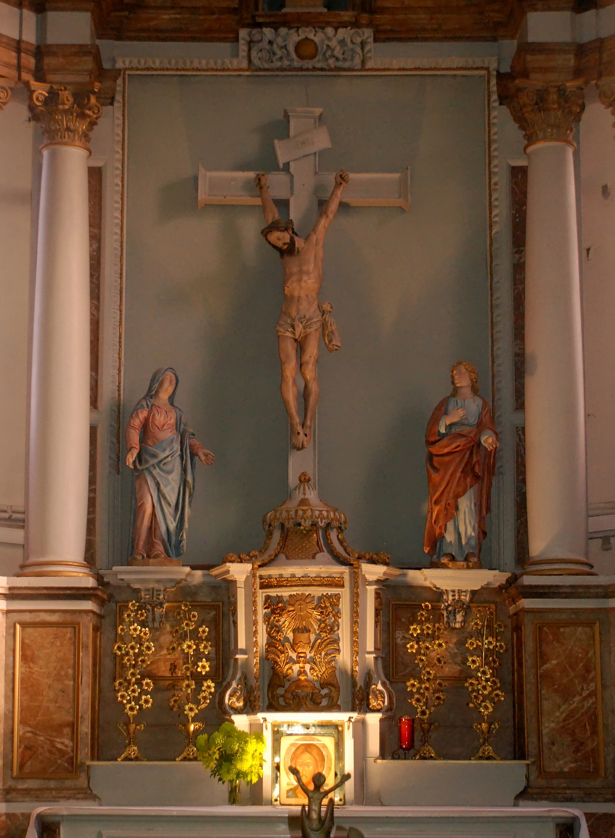 Belgique - Brabant wallon - Église de Court-Saint-Étienne